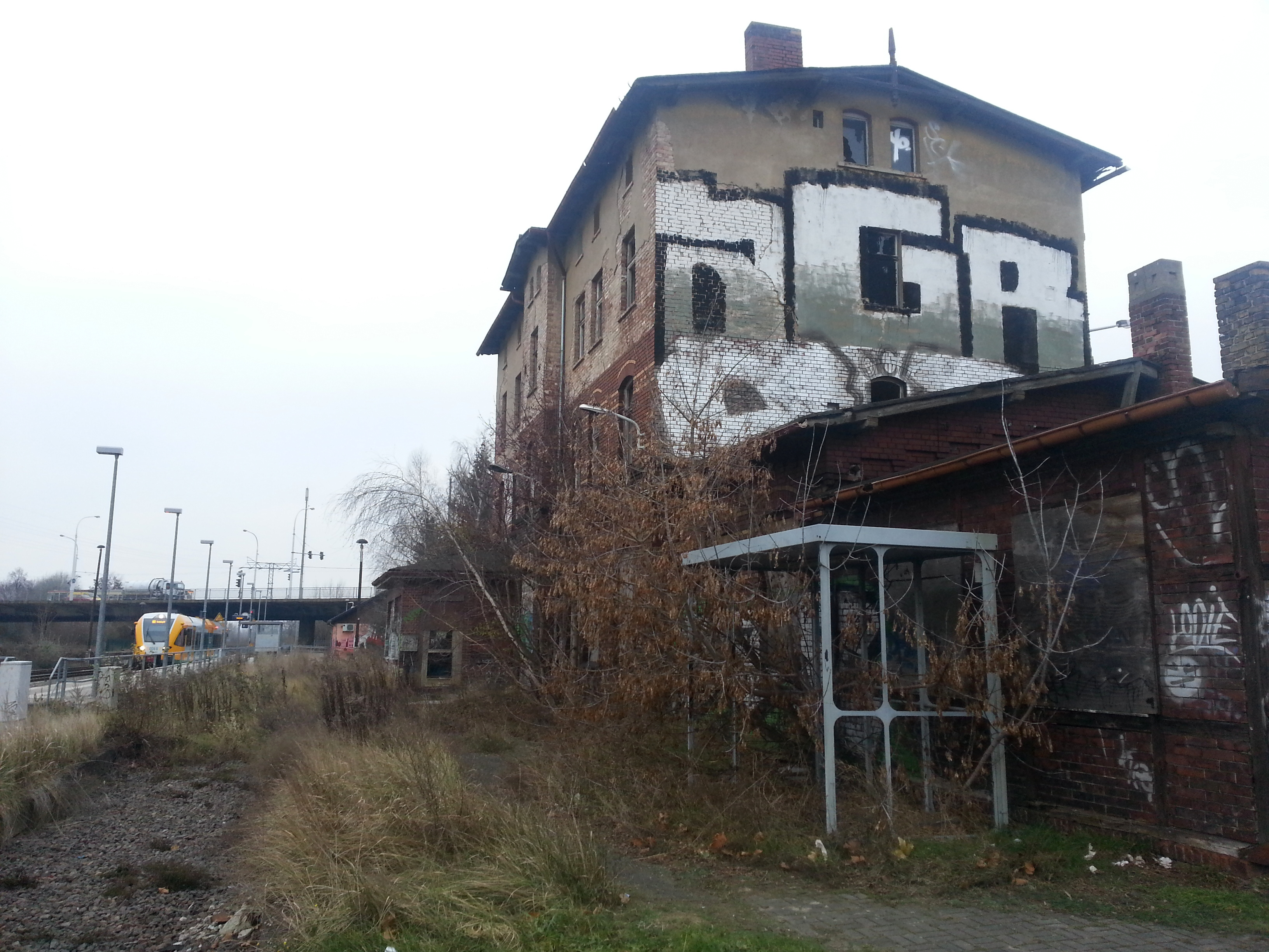 bahnhof brandenburg-altstadt